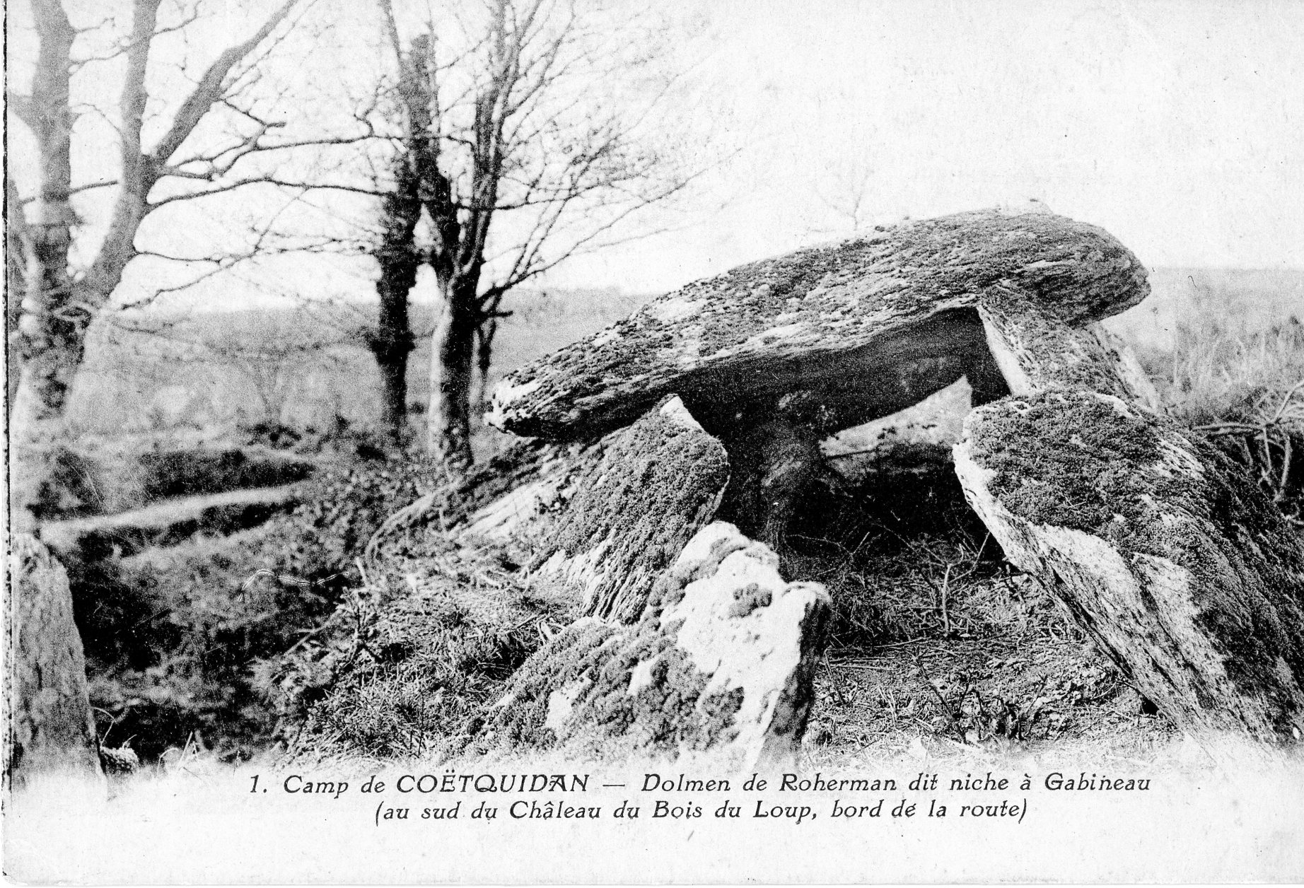 Il s'agit d'une carte postale de la collection u marquis de Bellevüe.